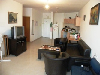 דירה של האגודה למען החייל